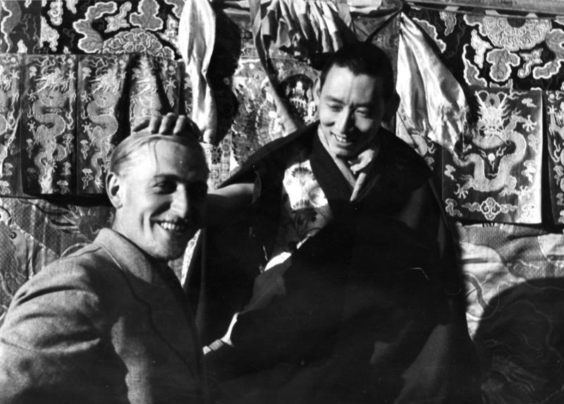 Lhasa, Regent und Beger